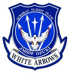 「ホワイトアローズ」のエンブレム